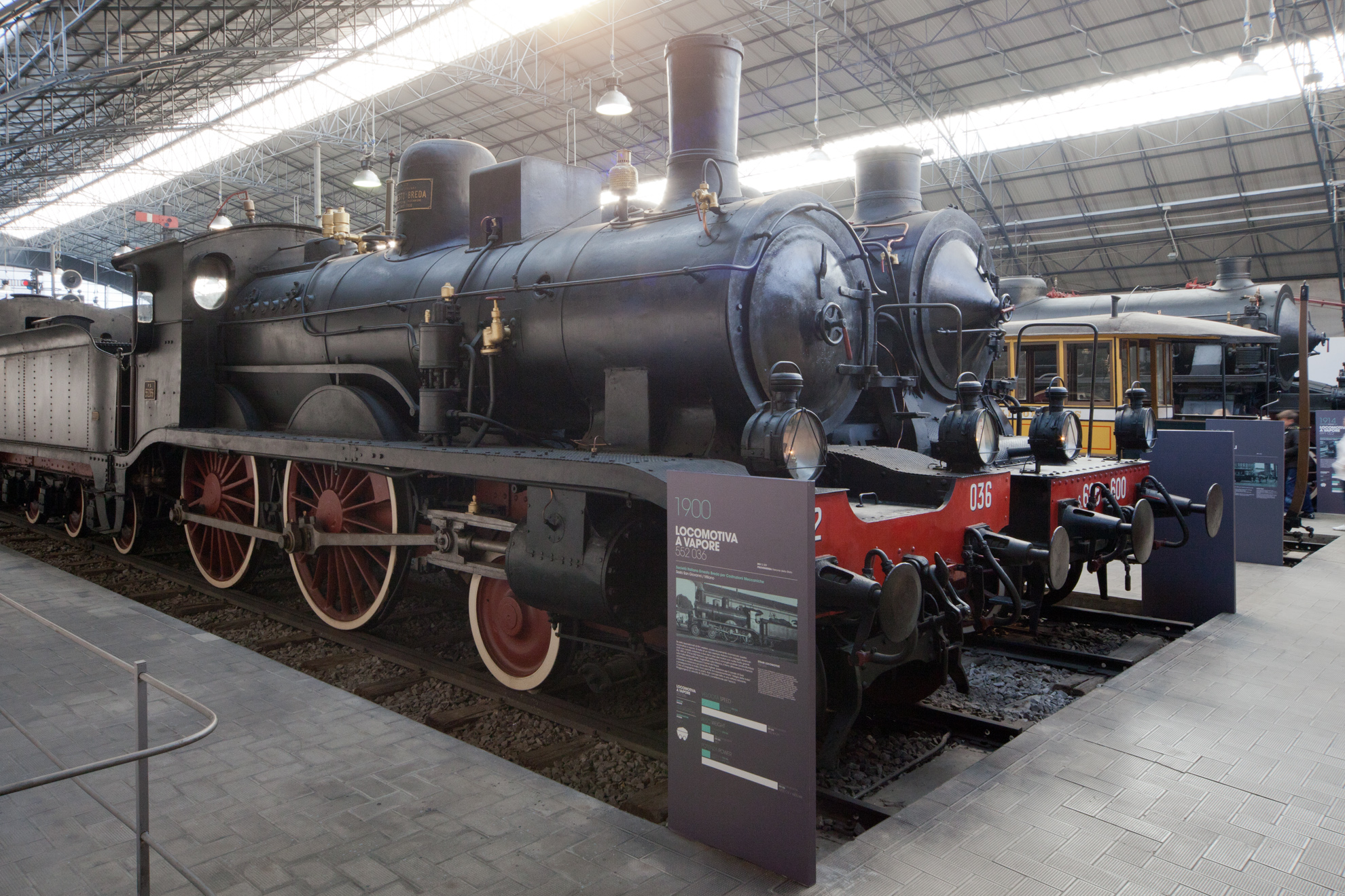 Locomotiva a vapore FS Gr 552 - 036 esposta presso il padiglione ferroviario del Museo Nazionale Scienza e Tecnologia Milano